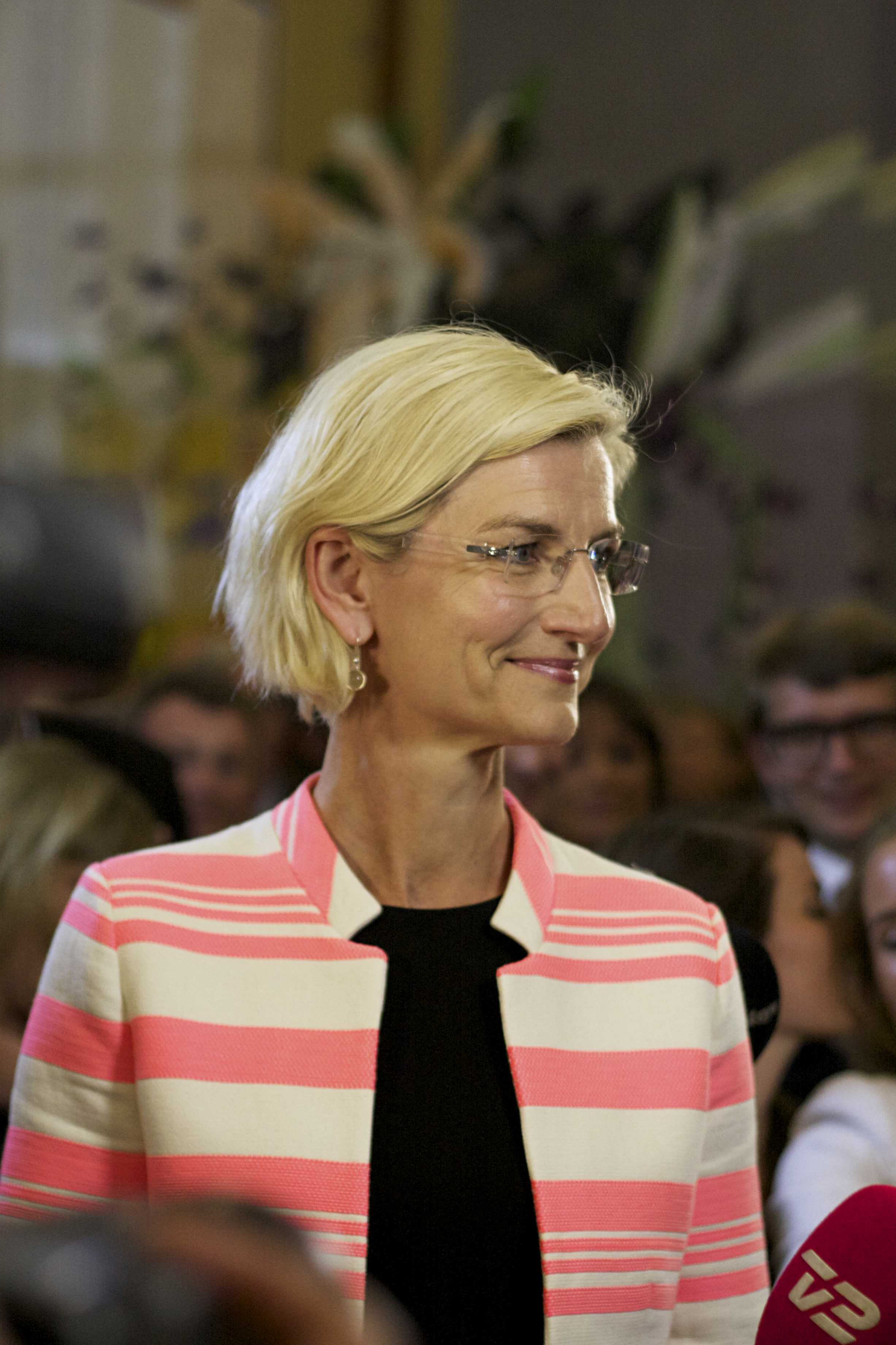 Venstres spidskandidat til Europa-Parlamentet, MF og fhv. minister Ulla Tørnæs.